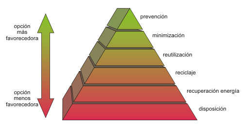 Jerarquia de los residuos según su tratamiento